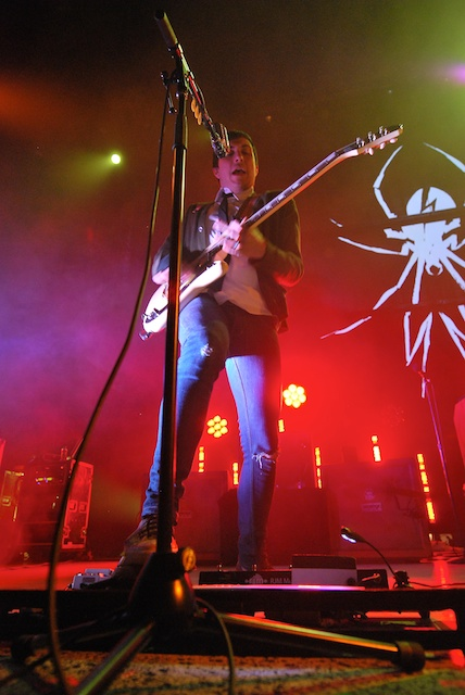 Frank Iero presentándose junto a My Chemical Romance en Montreal, Canadá, durante la gira Honda Civic Tour, el 16 de agosto de 2011.